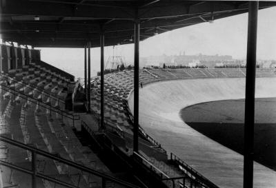 Old Galgenwaard Stadium